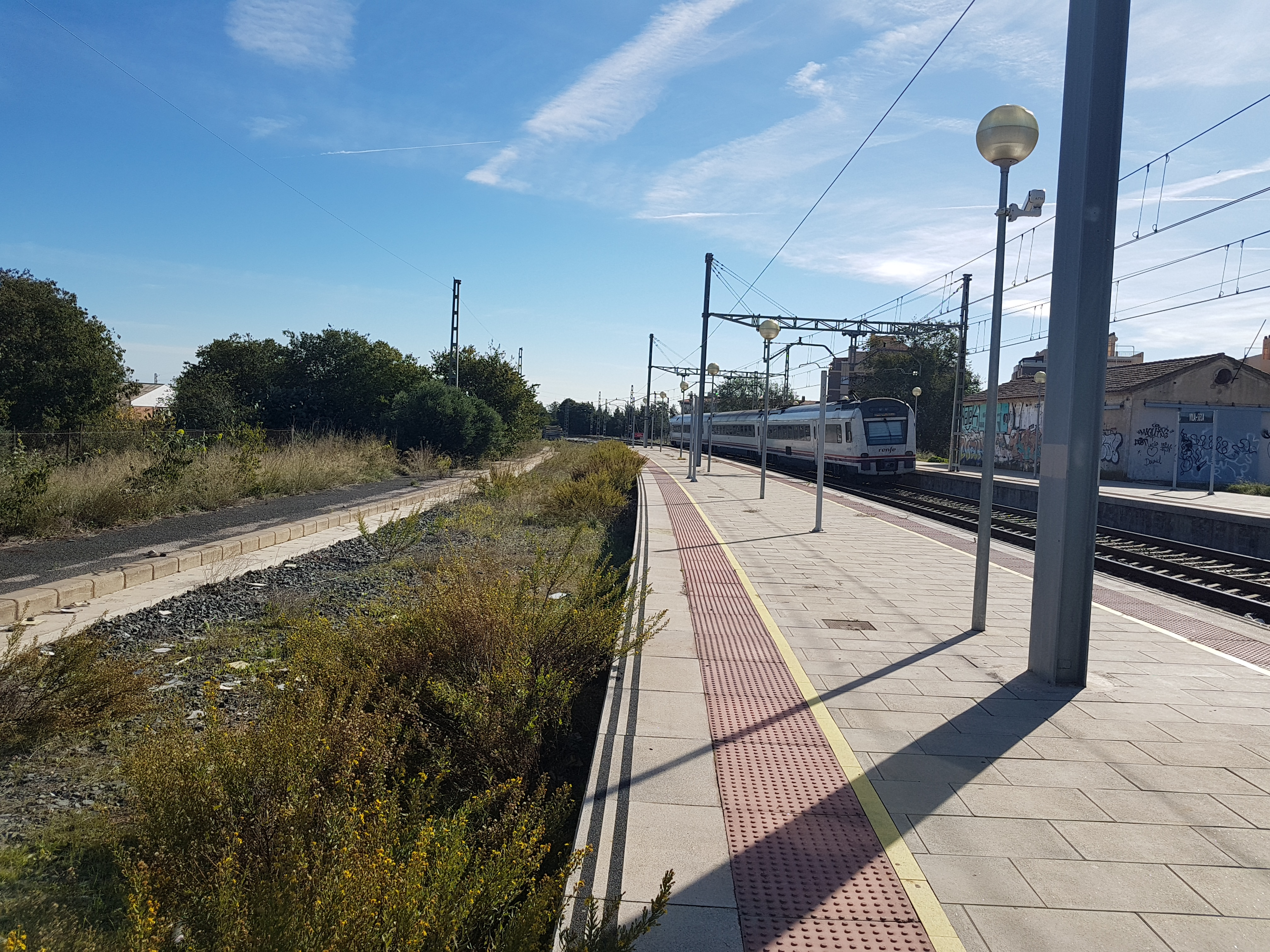 Tren de la sèrie d 448 amb servei regional R15 direcció Barcelona deixa l'estació de Vila-seca (Tarragonès) a la línia Tarragona-Reus-Lleida